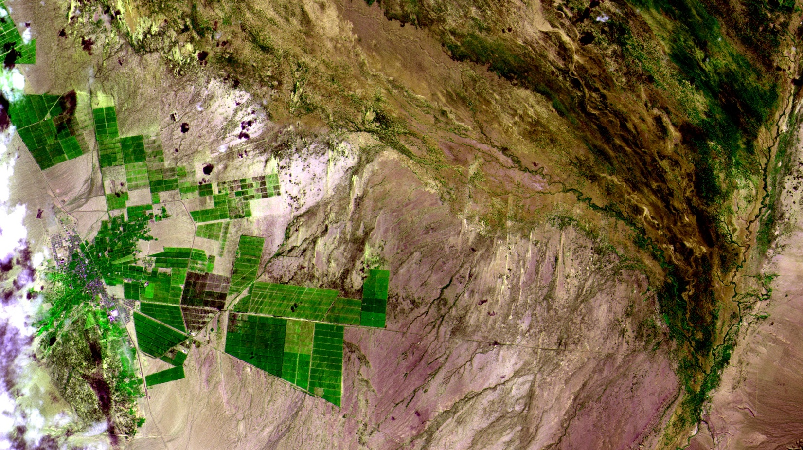 Villa de Concepción de Aimogasta, ao Norte da Provícia de La Rioja, Argentina, à esq. na imagem falsa-cor do satélite CBERS4, cercada pelos plantios irrigados de azeitona e jojoba, em tons de verde / At image left, Villa de Concepción de Aimogasta, North of Argentina´s La Rioja Province, surrounded by olive and jojoba irrigated plantations, in green. Em tons claros e rosados áreas com vegetação rala, composta por plantas xerófitas, devido ao clima semi árido continental / Whitish and light pink areas have very little xerophyte vegetation, due to semi-arid climate. À direita a bacia endorreica do Rio Salado, proveniente do Salar de Pipanaco. Em tons escuros áreas alagadas devido às chuvas recentes / To the right is Salado River endorreic basin, coming from Pipanaco salt plain. In black flooded areas due to recent concentrated rains. Daqui a duas semanas, no dia 24 de Maio, acontece a "Fiesta Nacional de la Olivicultura" em Aimogasta. Mesma data de sua fundação em 1591 / In two weeks, on May 24, at Aimogasta, happens "Fiesta Nacional de la Olivicultura". Same date of town foundation in 1591. Coordenadas do centro da imagem / Image center: 28°32'40.2"S 66°41'31.3"W Data / Date: 09-05-2018 / 2018-09-05 RGB 785 (falsa cor / false color) Cena / Scene: 174/132 Autor / Author: Oton Barros (DSR/OBT/INPE) Imagem em HD / HD Image Visite-nos / Visit us